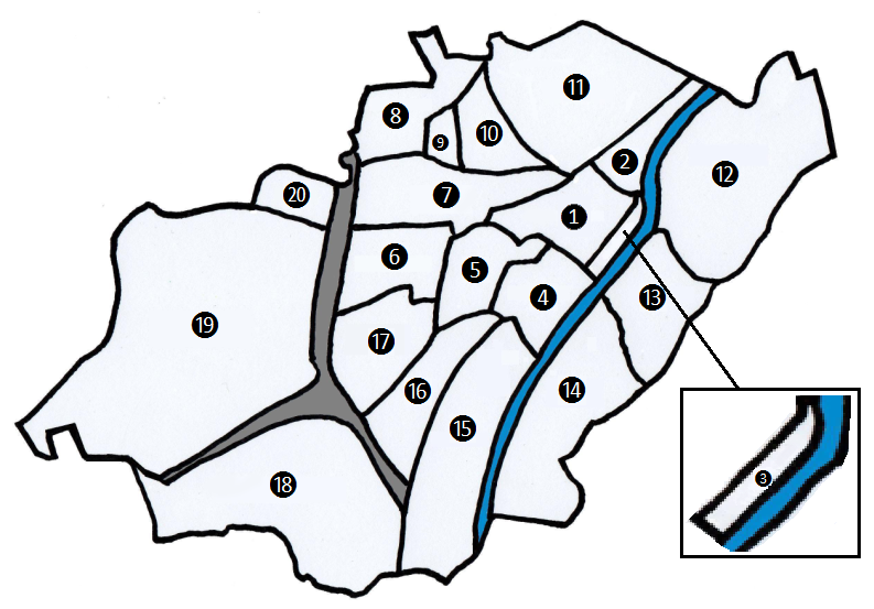 Carte des quartiers de la commune d'Anderlecht (Bruxelles/Belgique)